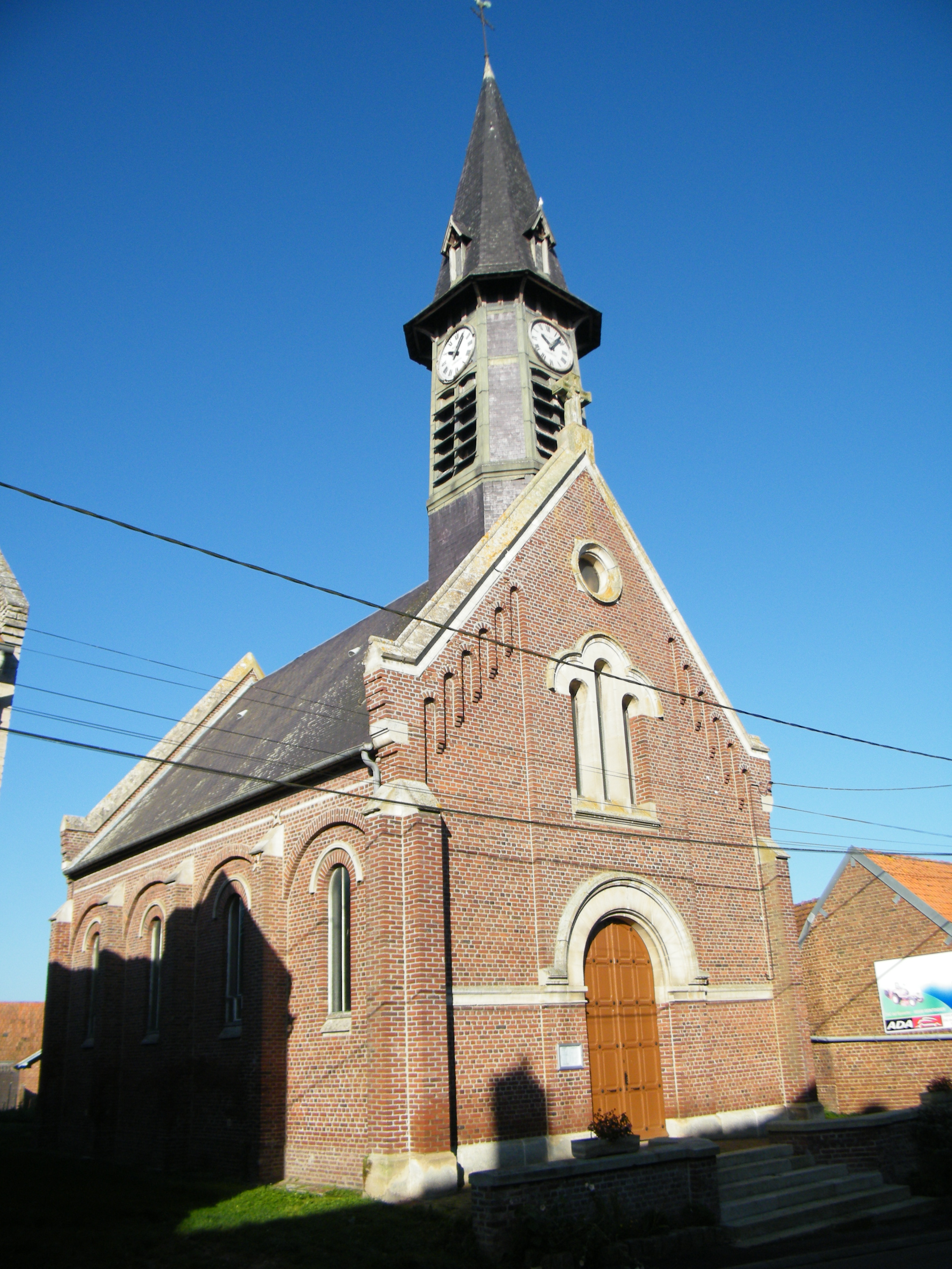 L'église Notre-Dame-de-Pitié de Rubescourt, Somme, France.